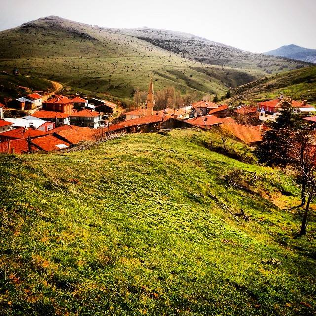 Tatlar Köyü'nün tepeden genel görüntüsü